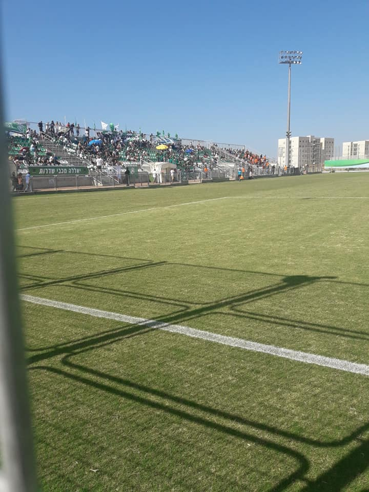 תמונת יציע המגרש במהלך משחק